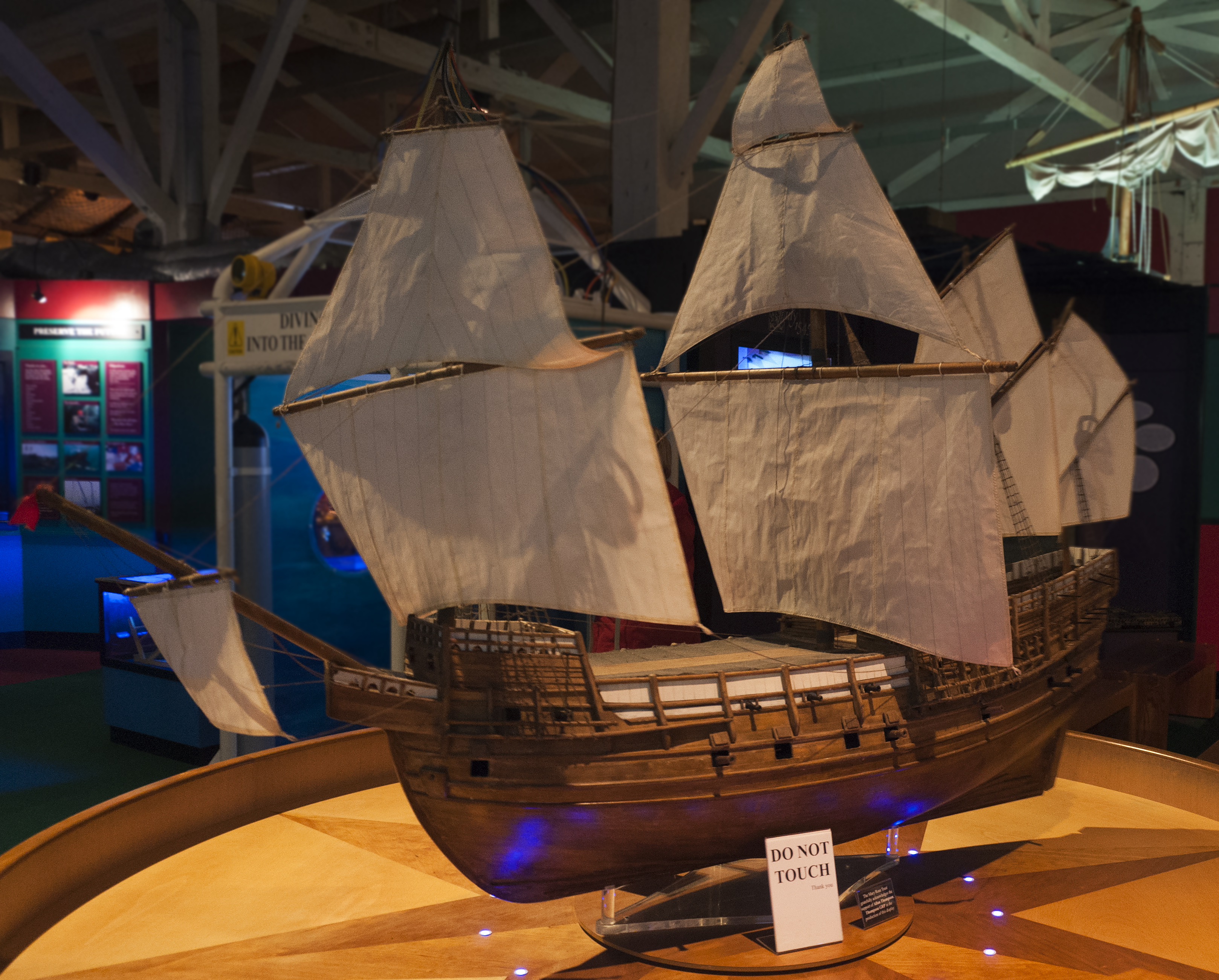 Maquette van de 16e-eeuwse Mary Rose in haar museum te Portsmouth, Engeland